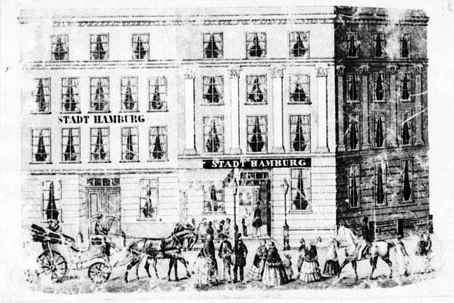 Hotel Stadt Hamburg, Geschäftskarte um 1850, Germ. Nationalmuseum